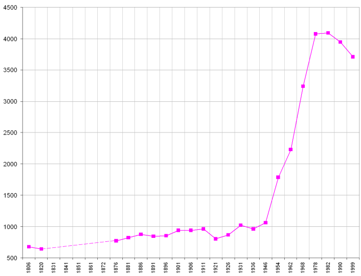 Population de Contrexéville (1806-2006).